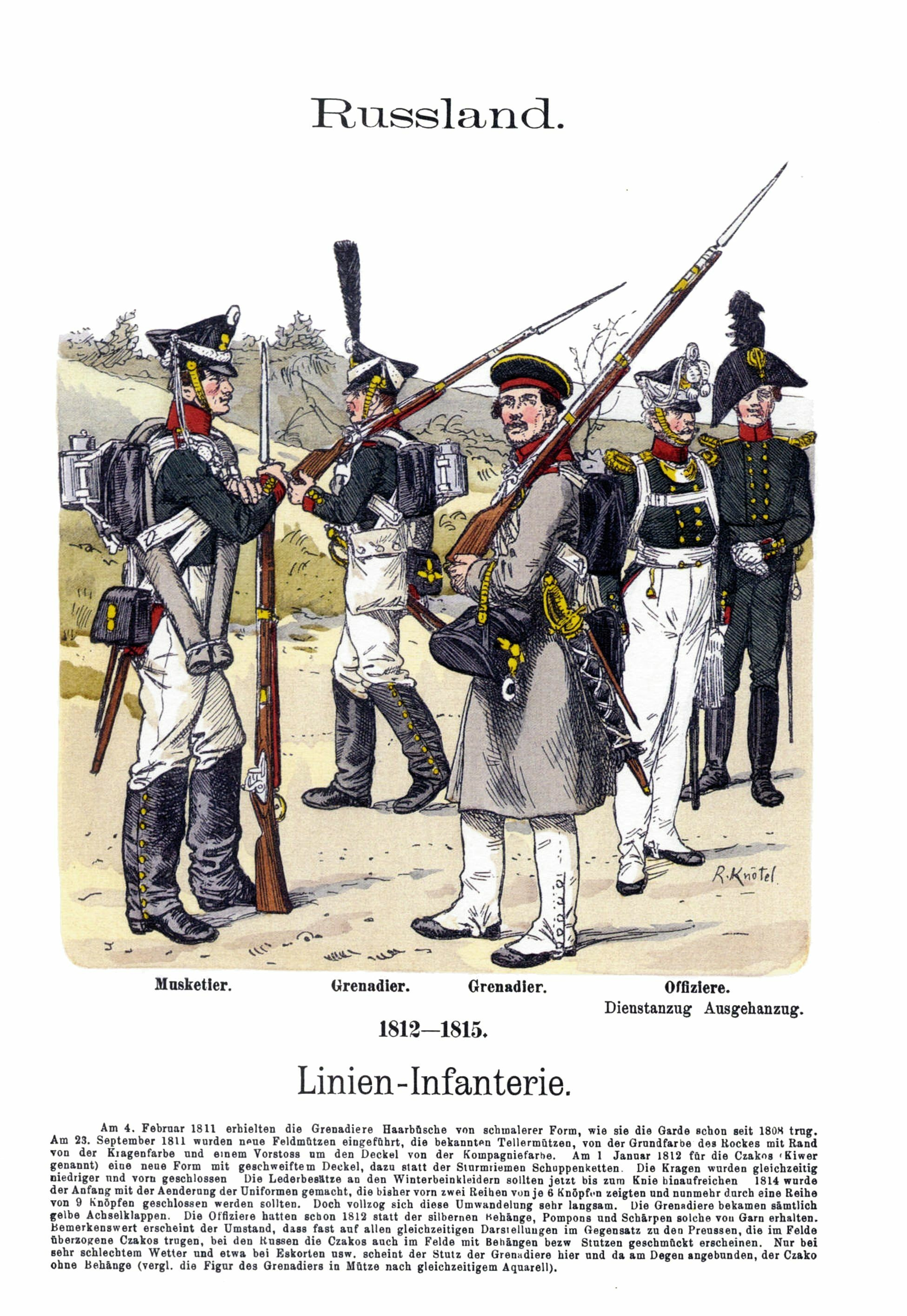 Иллюстрация Рихарда Кнотеля